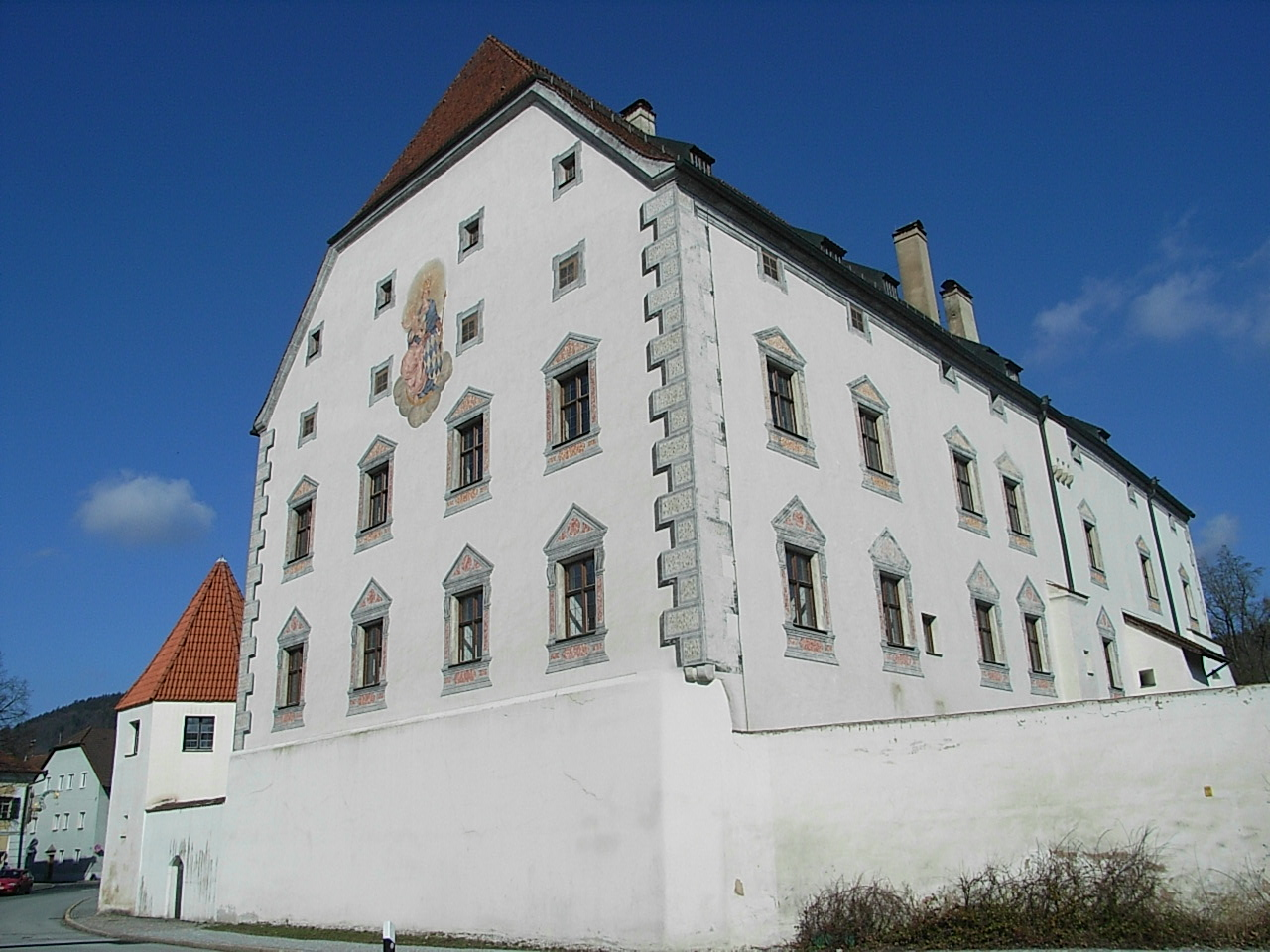 Schloss Obernzell